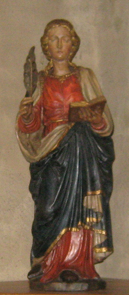 Heiligenstatue in der Basilika von St. Odiliënberg, natürlich als Odilia bezeichnet, vermutlich aber eine umgearbeitete Maria